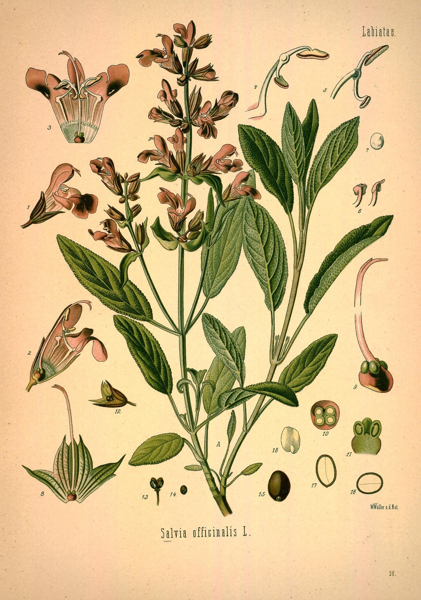 Echte Salbei. A blühende Pflanze in natürl. Grösse; 1 Blüthe, vergrössert; 2 dieselbe im Längsschnitt, desgl.; 3 aufgeschnittene Krone mit den inneren Blüthentheilen, desgl.; 4 u. 5 fruchtbare, 6 unfruchtbare Staubgefässe, desgl.; 7 Pollen, desgl.; 8 Kelch aufgeschnitten mit Stempel, desgl.; 9 Stempel, stärker vergrössert; 10 Fruchtknoten im Querschnitt, desgl.; 11 derselbe im Längsschnitt desgl.; 12 Frucht mit Fruchtkelch, natürl. Grösse; 13 Frucht ohne Fruchtkelch, desgl.; 14 Nüsschen, desgl.; 15 dasselbe, vergrössert; 16 u. 17 dasselbe im Quer- und Längsschnitt, desgl.; 18 Same, desgl.